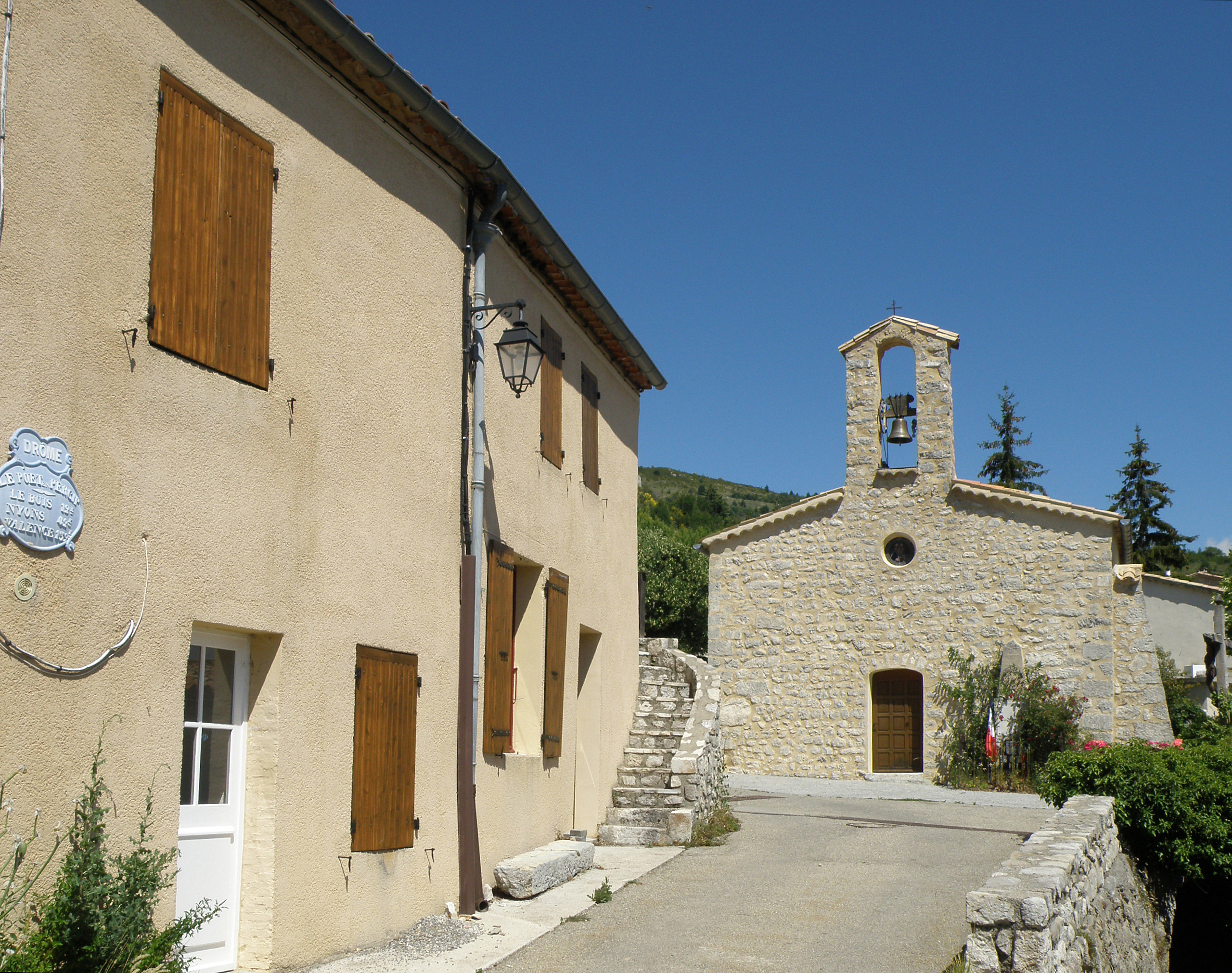 Le Poët-en-Percip (Drôme, France). Aspect du vieux bourg, église Saint-Simon.